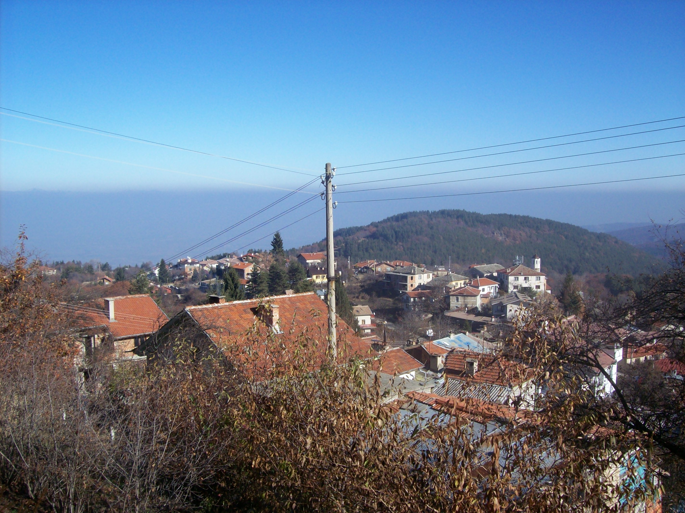 Иззглед към мъглив Пловдив, Бойково